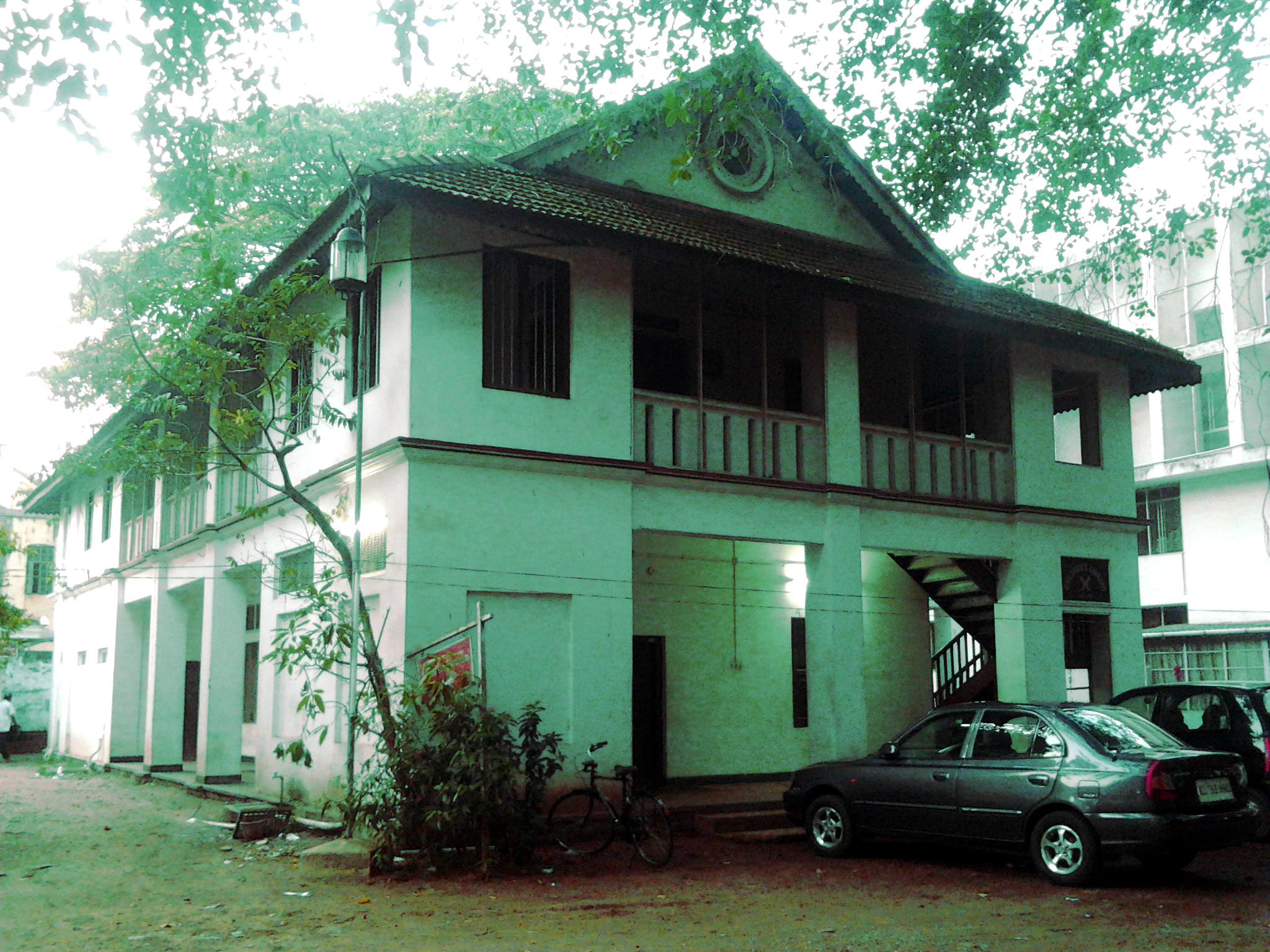 കൊല്ലം പബ്ലിക് ലൈബ്രറി കുട്ടികളുടെ വായനശാല